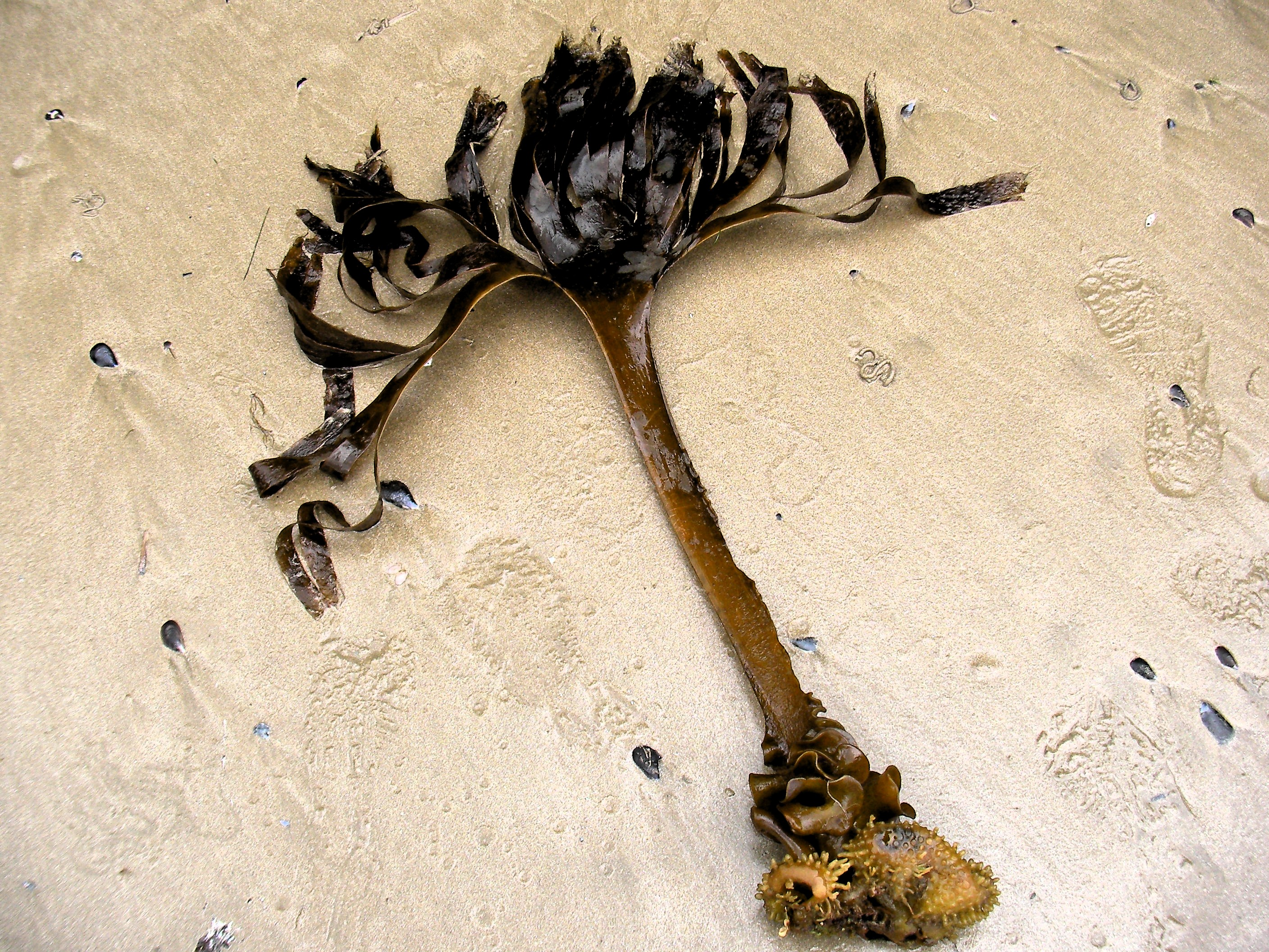 Alga chamada Golfo (Sacchorhiza polyschides) nunha praia galega